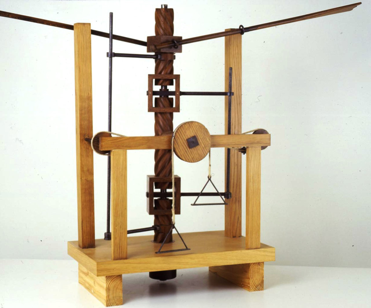 Il modello è' costituito da una struttura di legno sulla quali sono fissati una puleggia con due staffe e corde e da sei viti senza fine poste verticalmente nel centro e collegati da madreviti e anelli di giunzione. Alle viti sono fissate ai due lati barre orizzontali fi ferro a loro volta unite da due barre verticali collegate tramite due corde alla puleggia centrale. Sulla vite superiore è avvitata una madrevite du cui si innestano le basi di due strutture alari (non ricostruite), che fanno perno attraverso due anelli posizionati sulla struttura portante. Funzione Questo modello interpreta uno studio di meccanismo per la propulsione delle ali battenti. Modalità d'uso Questo modello è uno dei numerosi sistemi disegnati da Leonardo per ridurre lo sforzo del pilota e moltiplicare così il rendimento dei suoi muscoli Ognuna delle sei viti è a sei filettti e gli effetti della loro rotazione entro le madreviti si sommano, in modo da provocare un moto alterno dei bracci delle ali, innestati nella madrevite superiore, molto più ampio del movimento impresso alle leve collegate dalle due aste verticali in ferro. Queste vengono azionate, tramite le funi e pulegge, dalle due staffe anteriori, in cui vanno i piedi del pilota.